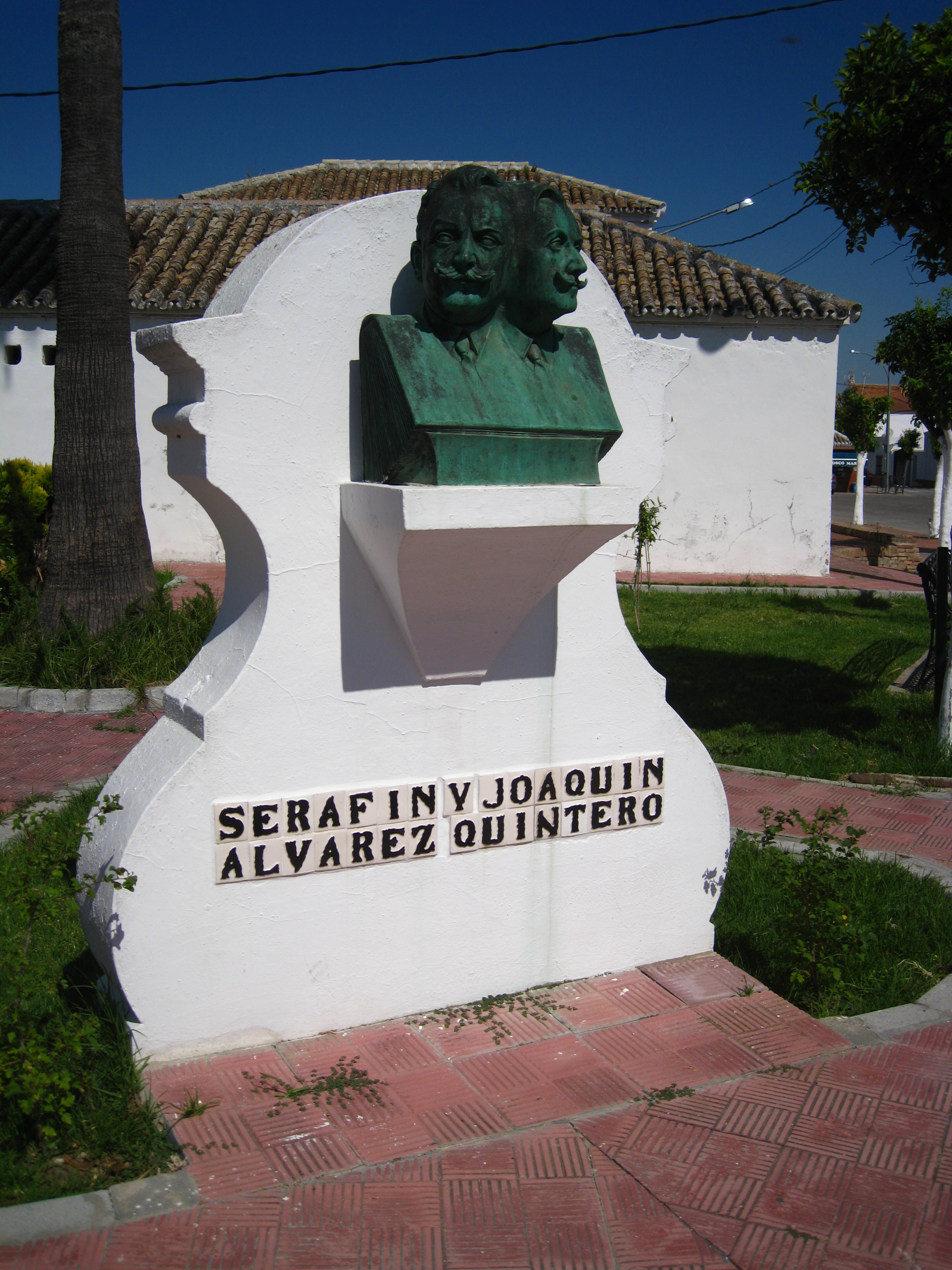 Monumento a los escritores Joaquín y Serafín Álvarez Quintero, en Guadalema de los Quintero (Sevilla, España)